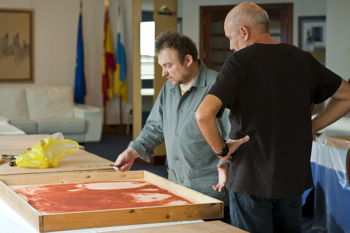 El pintor Miquel Barceló estuvo en Lanzarote firmando su obra gráfica.